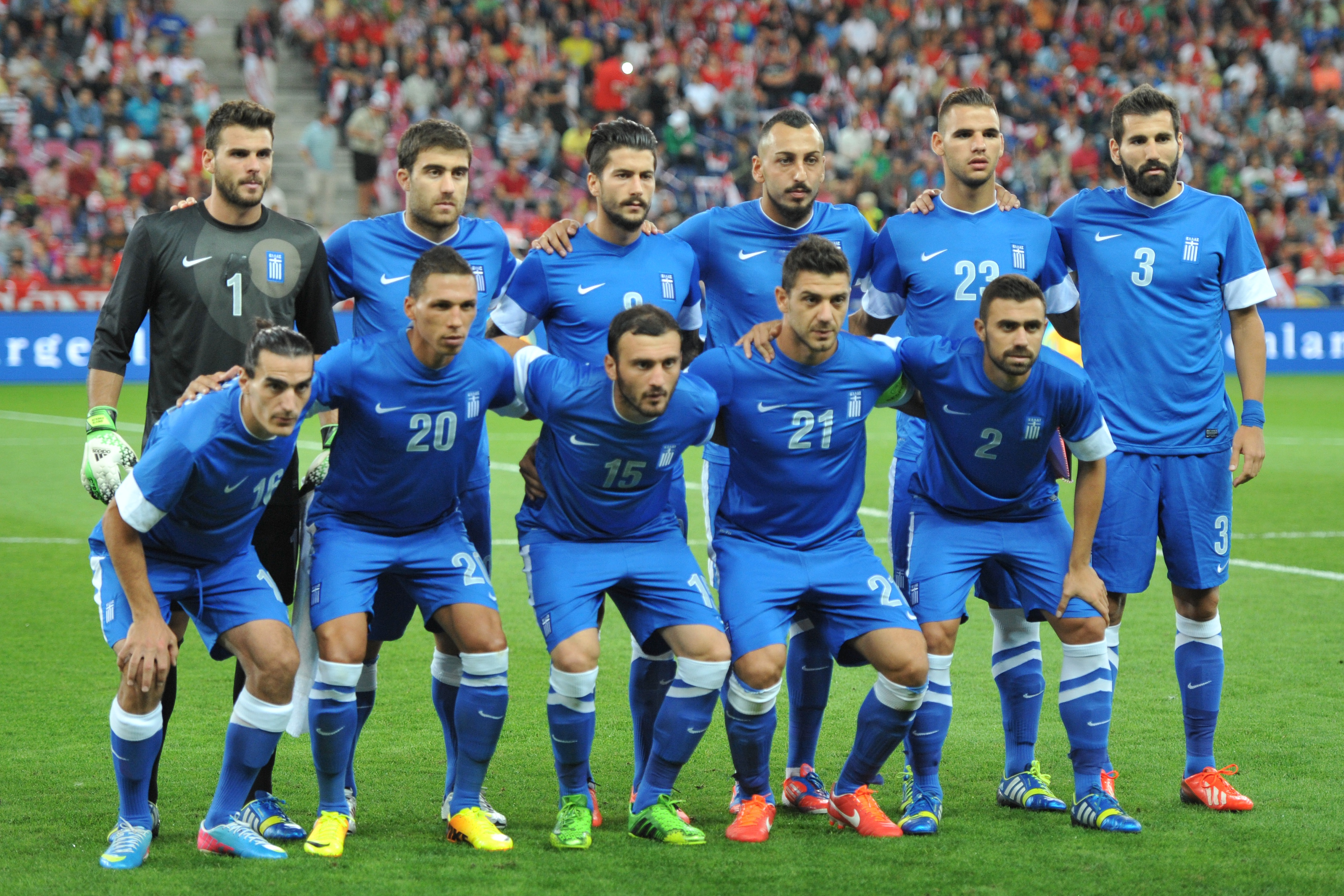 Freundschaftliches Länderspiel Österreich - Griechenland am 14. August 2013 in Salzburg: Nationalteam Griechenland